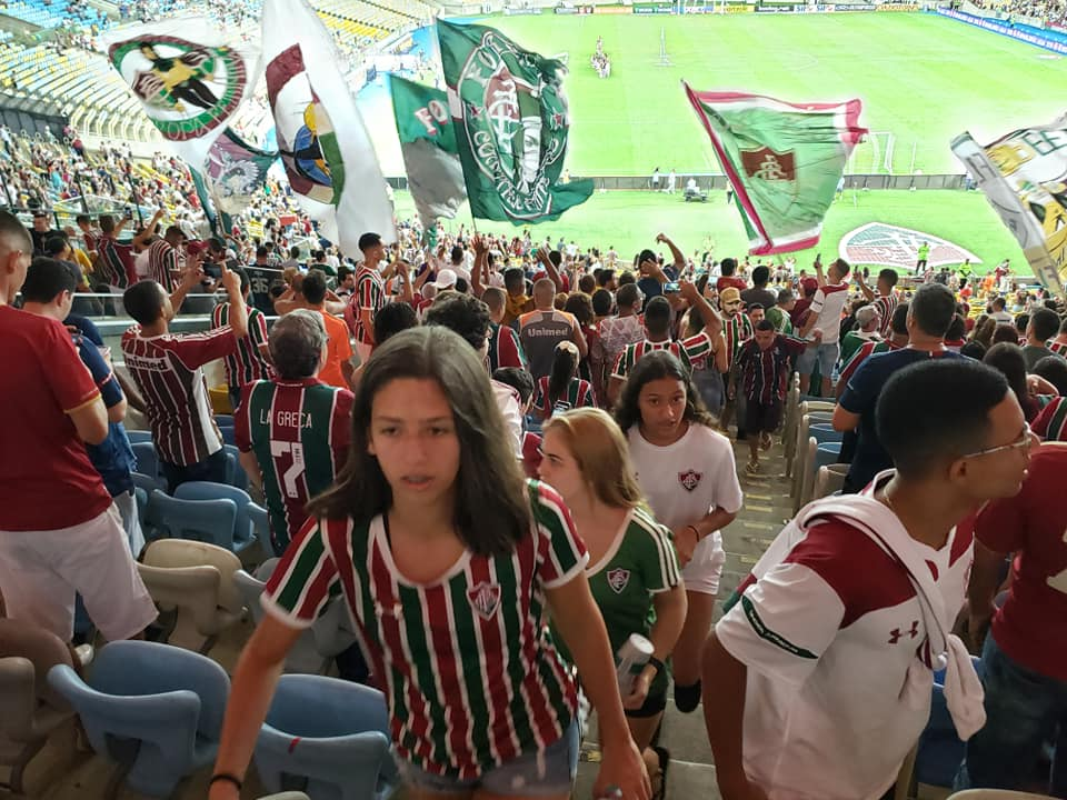 Torcida do Fluminense Footbal Club no corredor do Maracanã antes do empate do clube por 0 a 0 em 4 de dezembro de 2019, perante 39.965 torcedores pouco antes da partida começar.